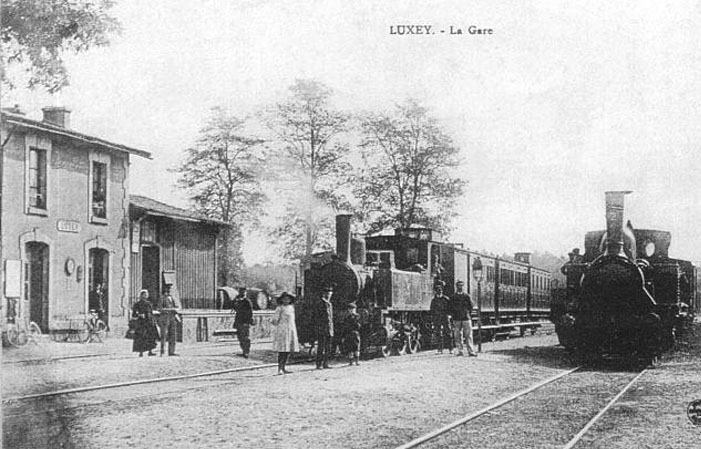 Intérieur de la gare de Luxey au début des années 1900.